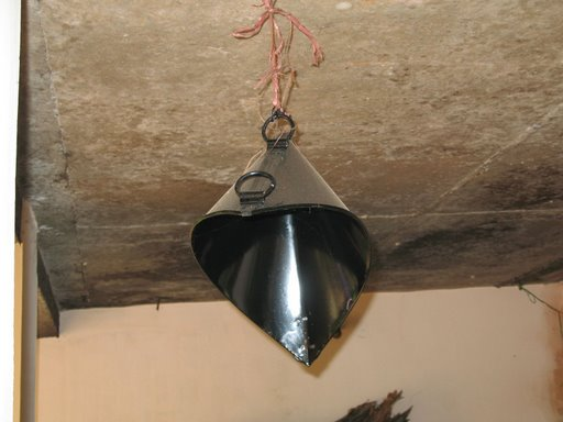 Tevukotta